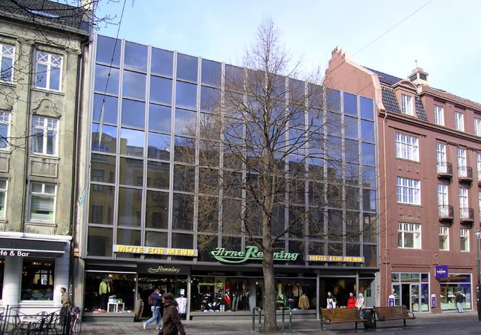 Rønninggården, Nordre gate 10, Trondheim. Bygd 1972. Arkitekter: Lien & Risan